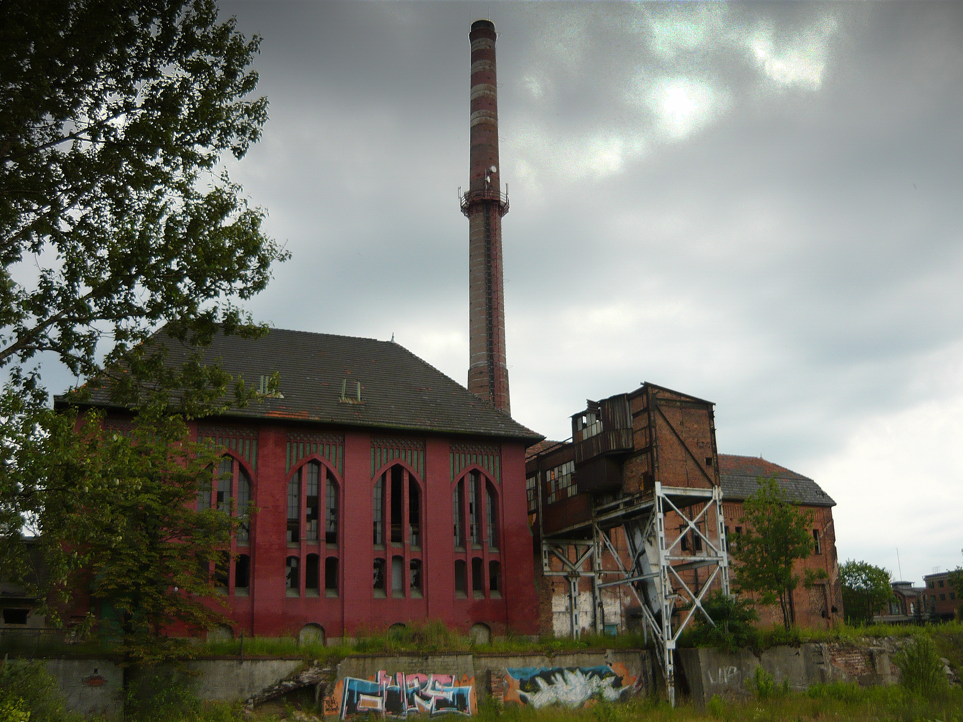 Maszynownia szybu Bończyk (projekt Georga i Emila Zillmannów) i kotłownia kopalni węgla kamiennego Rozbark. .